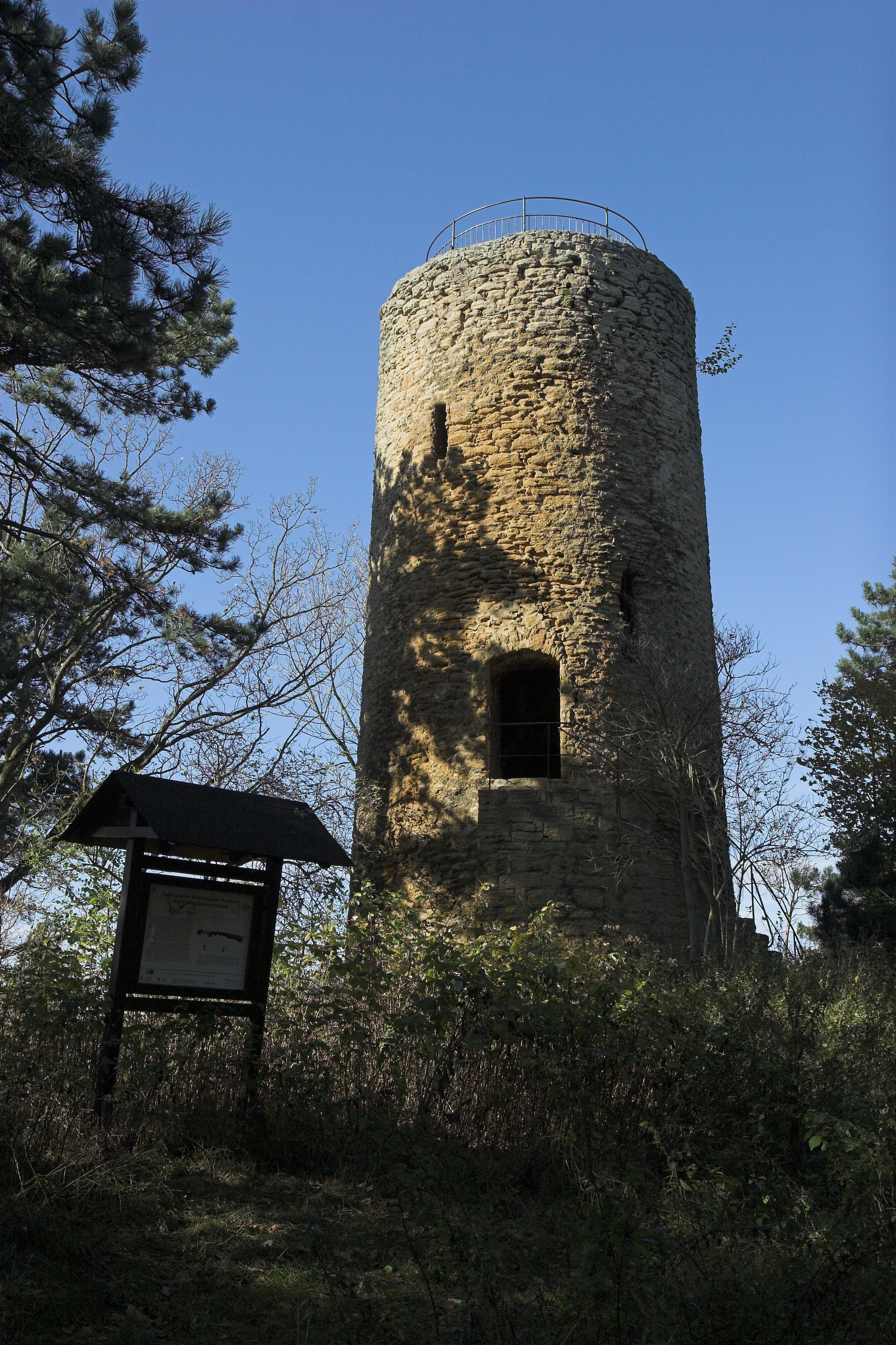 Der Aussichtsturm auf dem Gipfel des Sudmerberges